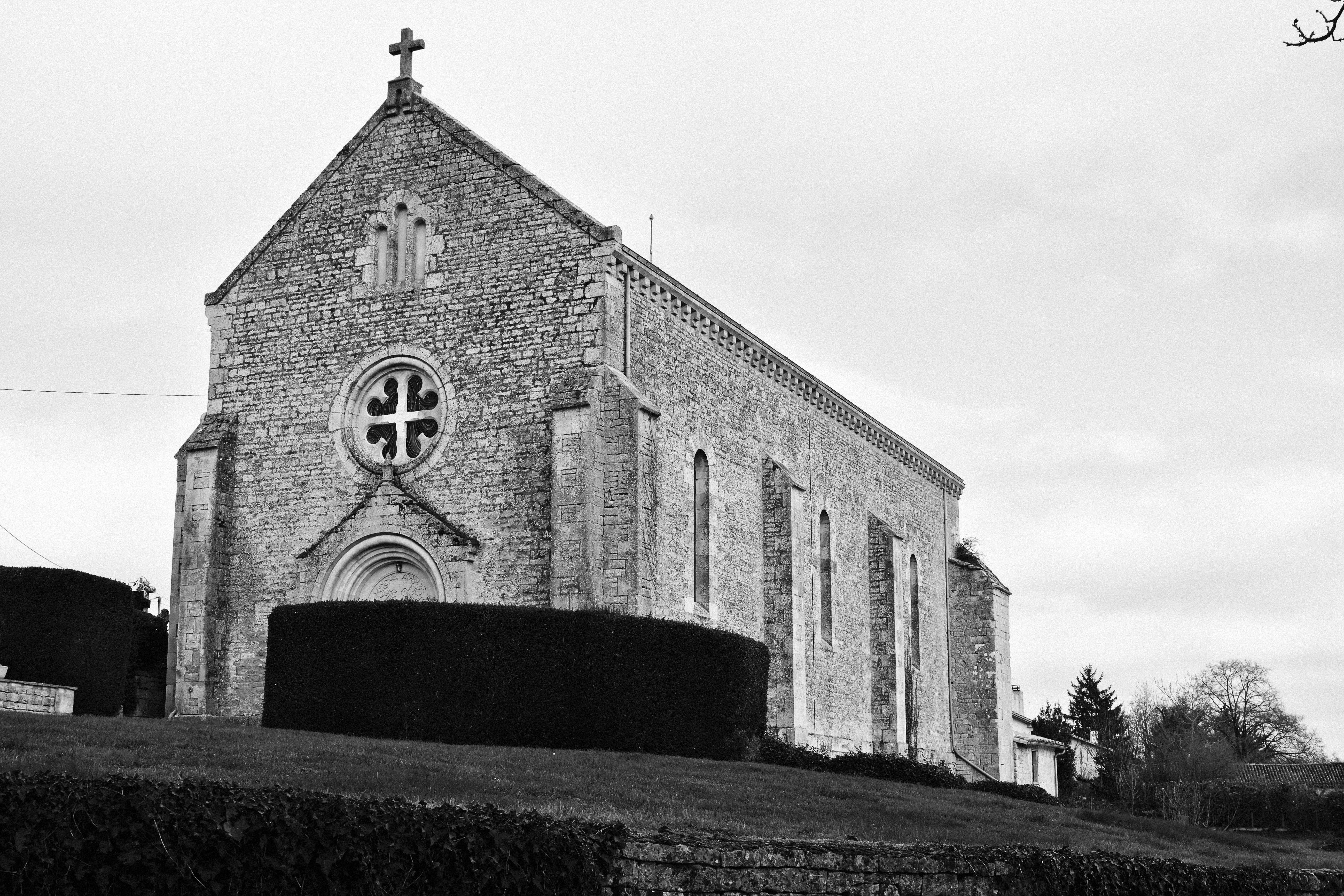 Prieuré de bénédictins Saint-Pierre-ès-Liens, Paizay-le-Tort